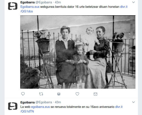 Euskaldunei schadenfreude linguistikoa sortzen dien adibideetako bat, Gipuzkoako udalerri bateko twitter kontuan.